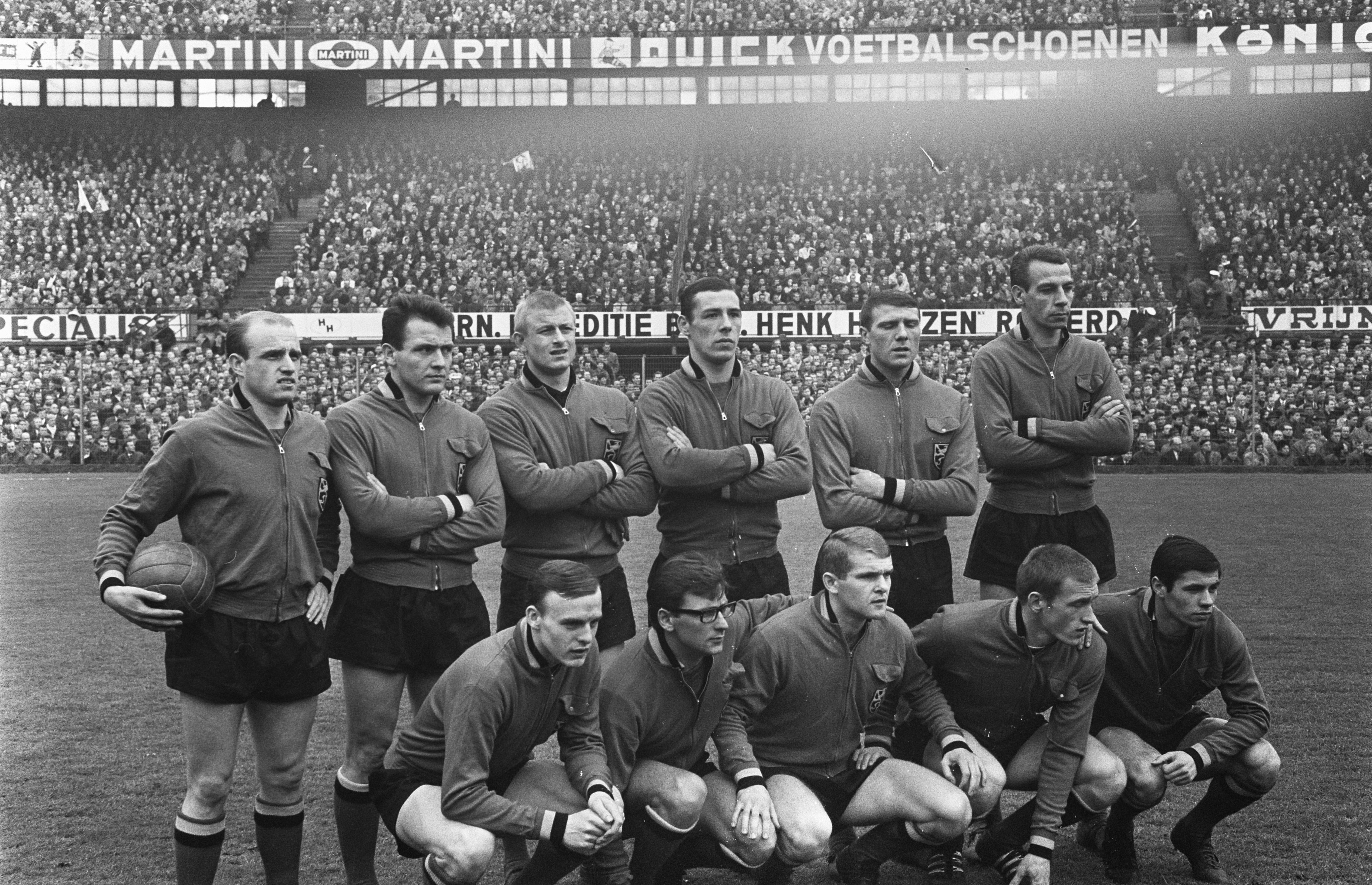 Collectie / Archief : Fotocollectie Anefo Reportage / Serie : [ onbekend ] Beschrijving : Nederland tegen Belgie 3-1, Belgisch elftal, Heylens, Bare, Trappeniers, Michiels, Plaskie, Spronck, Thio, Jurain, Verheyen, Van Himst Datum : 17 april 1966 Locatie : Rotterdam Trefwoorden : elftallen, groepsportretten, sport, voetbal Persoonsnaam : Himst, Paul van Fotograaf : Nijs, Jac. de / Anefo Auteursrechthebbende : Nationaal Archief Materiaalsoort : Negatief (zwart/wit) Nummer archiefinventaris : bekijk toegang 2.24.01.05 Bestanddeelnummer : 919-0402